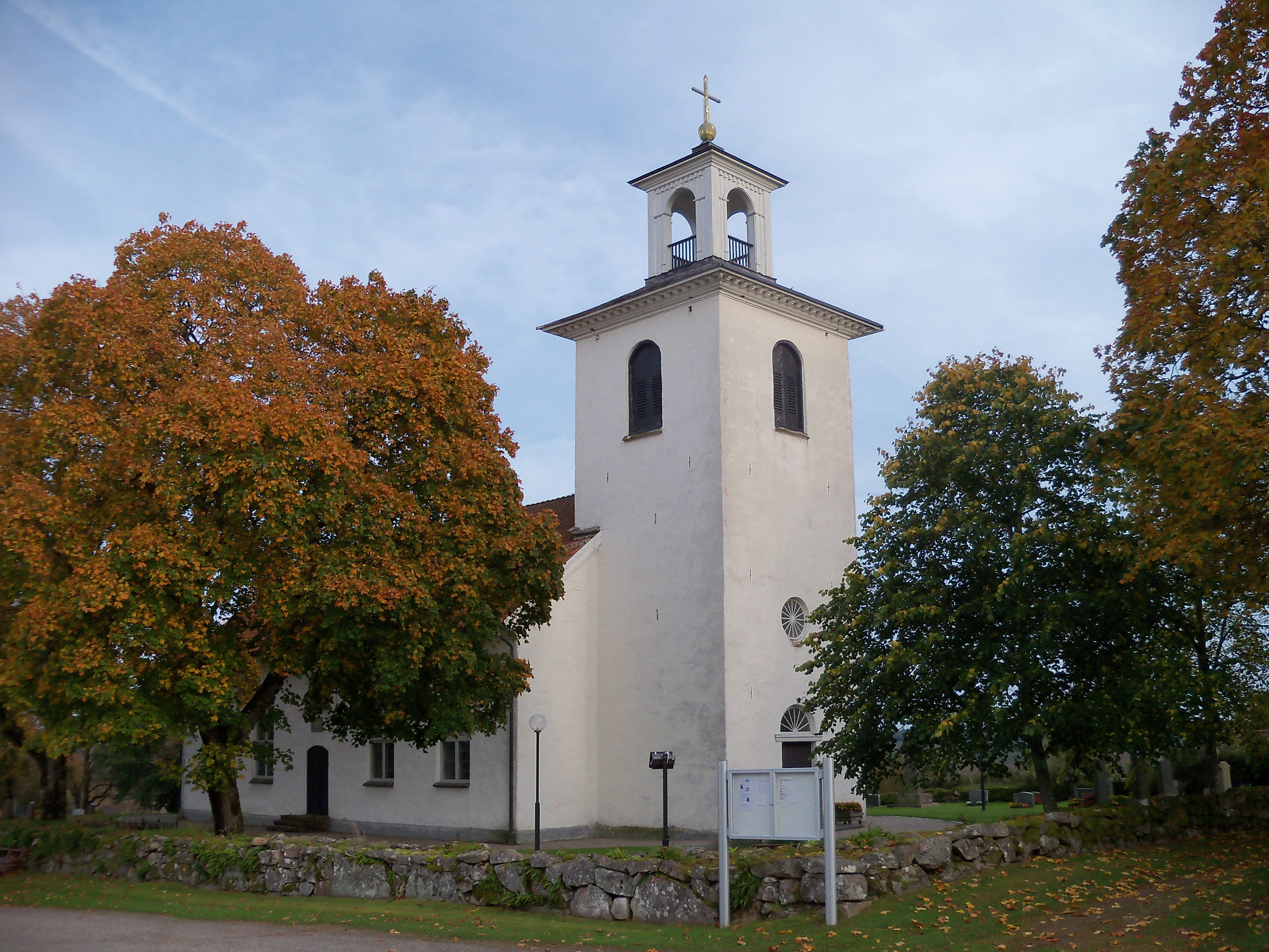 Gullereds kyrka